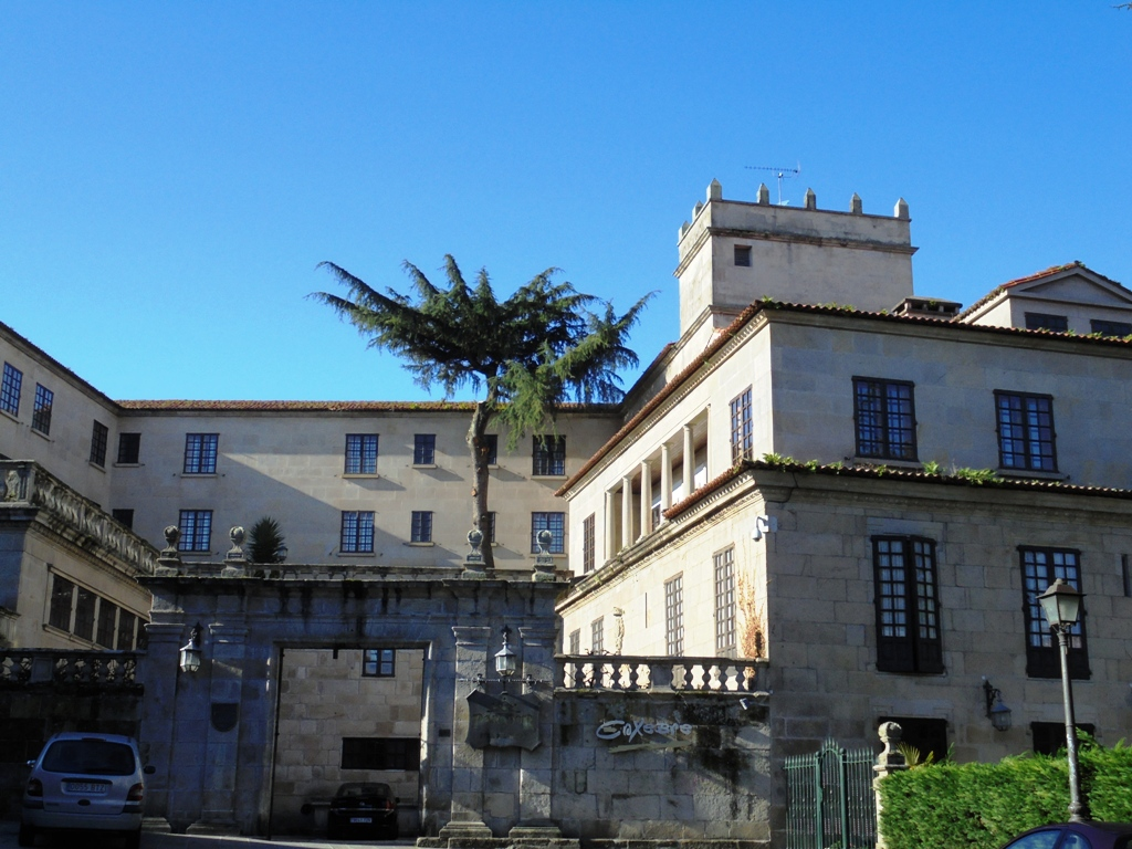 Parador casa del Barón Pontevedra capital palacio renacentista del siglo XVI